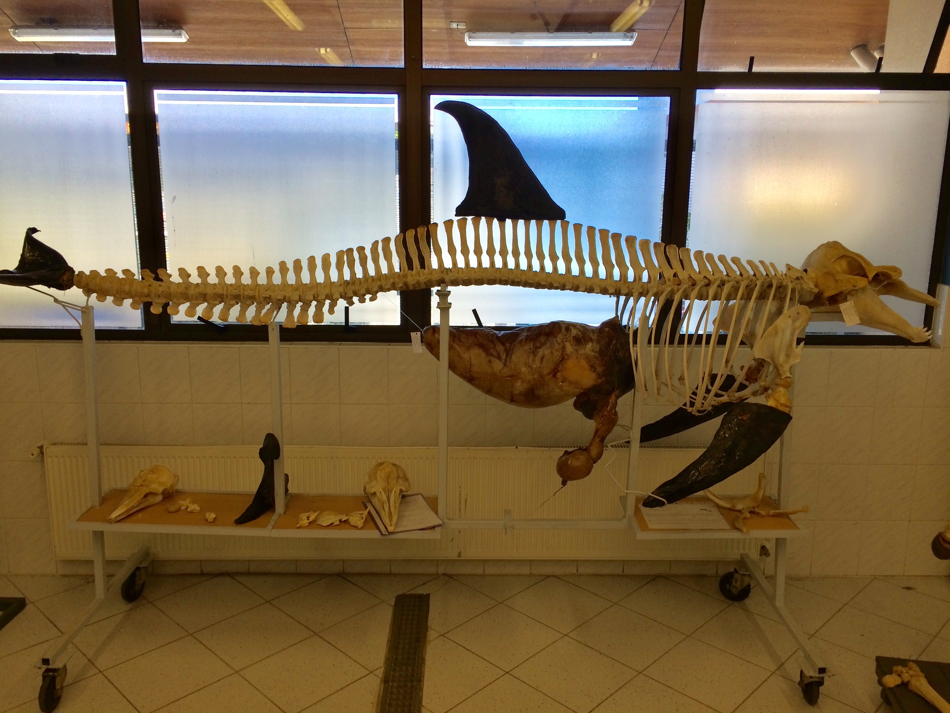 Esqueleto montado de Grampus griseus, perteneciente a la colección de zoología de la Facultad de Medicina Veterinaria de la Universidad San Sebastian, Chile